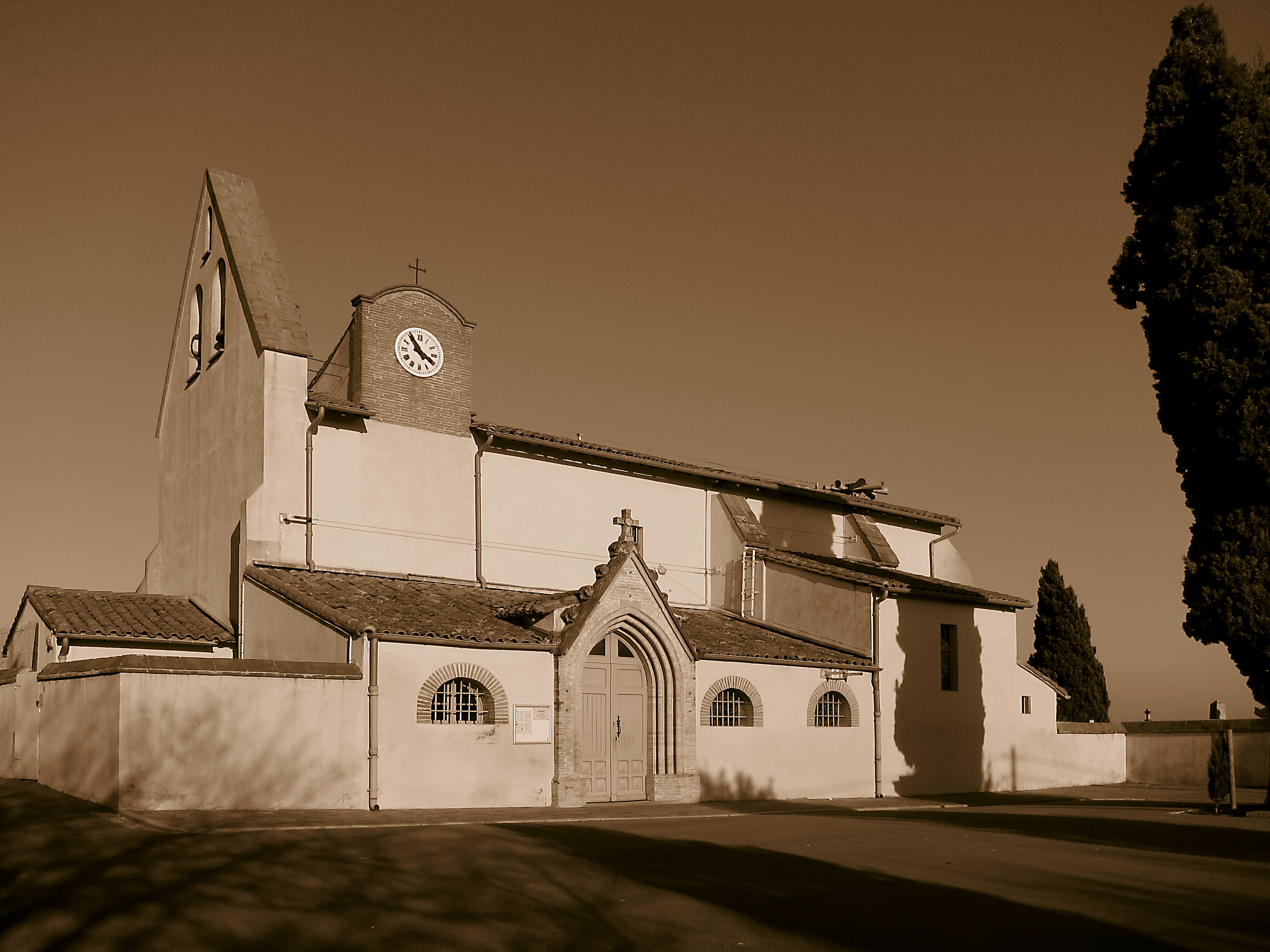 Toulouse (Haute-Garonne, Midi-Pyrénées, France) : L'église Saint-Étienne à Montaudran.